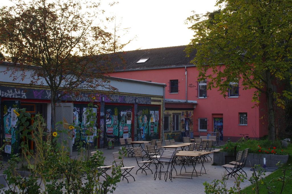 Blick auf den Außenbereich des Cafes.